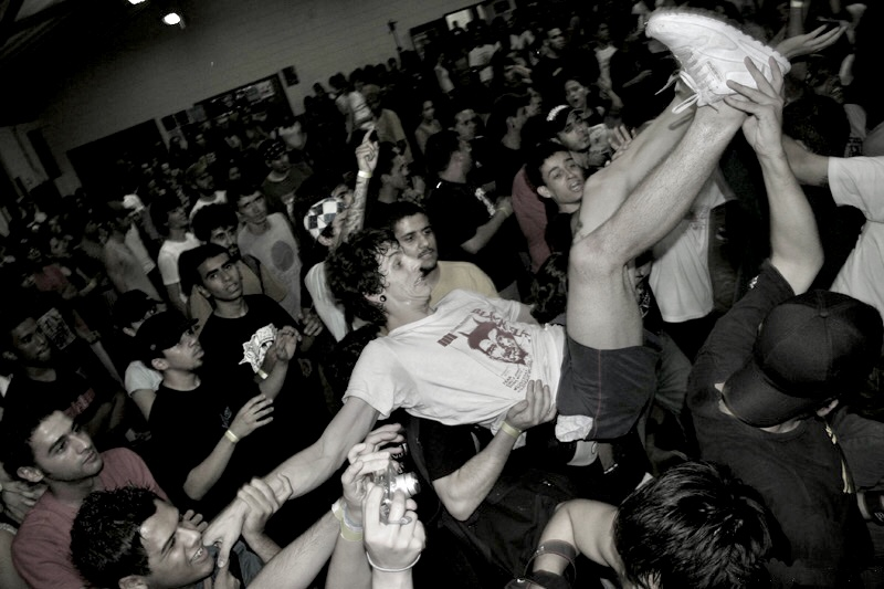 Animal Liberation Fest II: 22 setembro de2007 Ao publicar, por gentileza, dar os devidos créditos: Contato: Msn: ¬¬